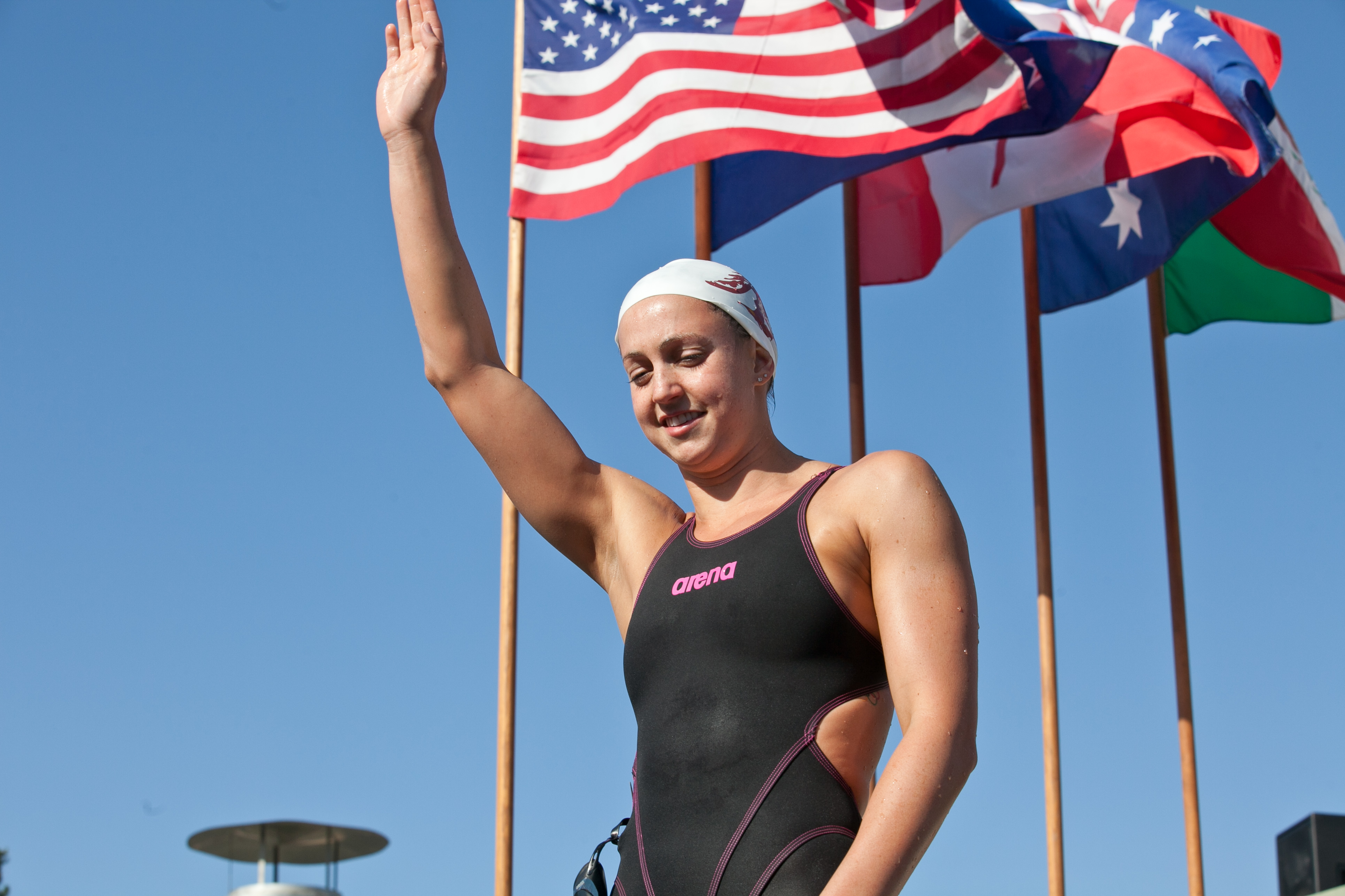 Winners stand